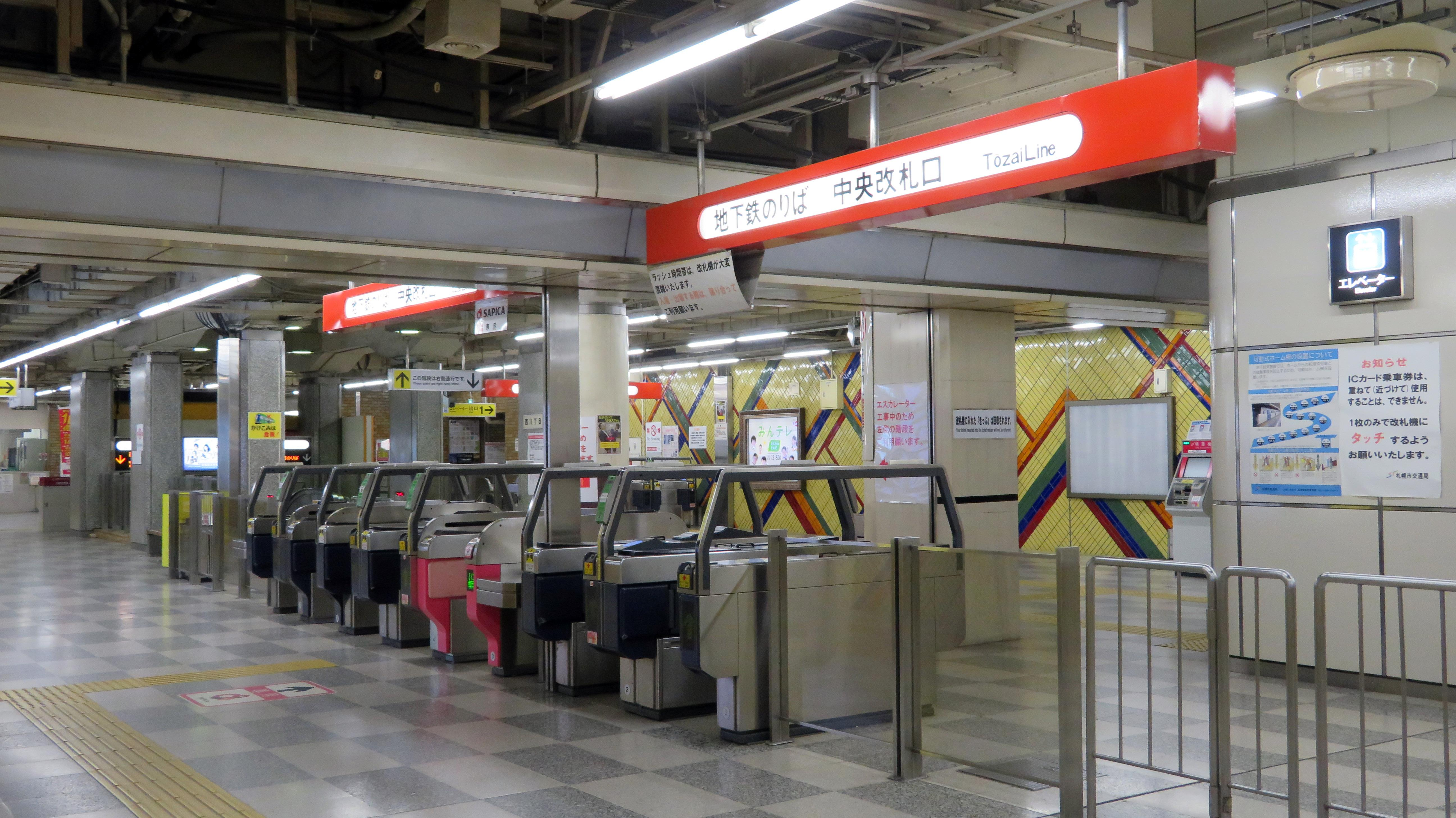 西11丁目駅改札口